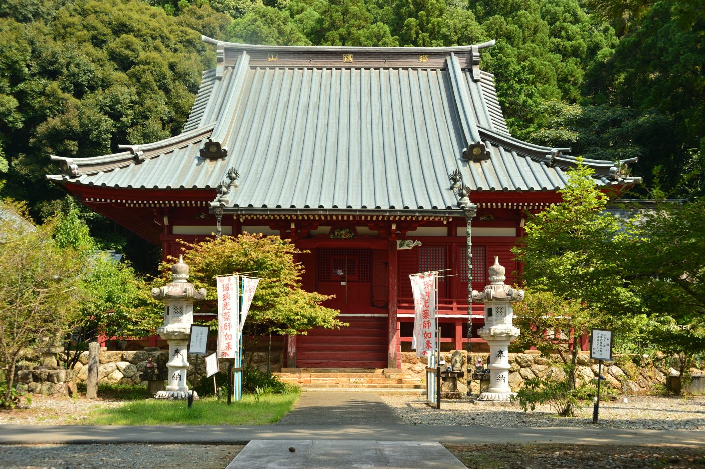 静岡県浜松市北区にある高野山真言宗の寺院の本堂。